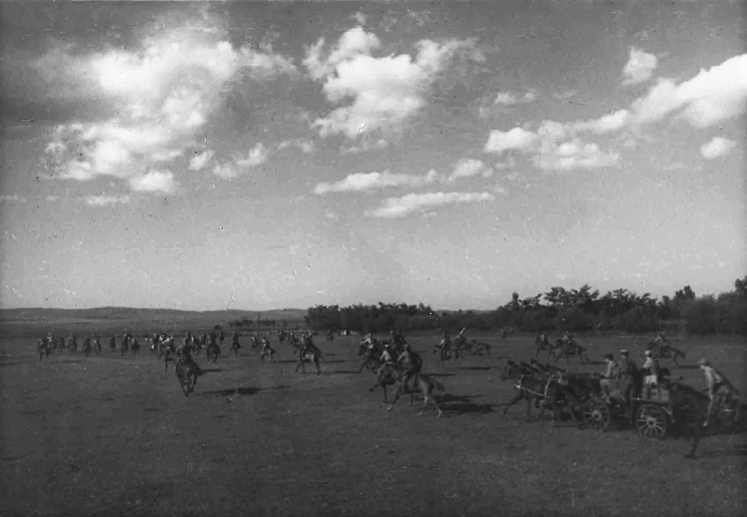 Район Моздока. После артиллерийской подготовки конные автоматчики эскадрона под командованием капитана В.Л. Качеровского, атакуют в районе посёлка М. переправившуюся через водный рубеж группу немцев